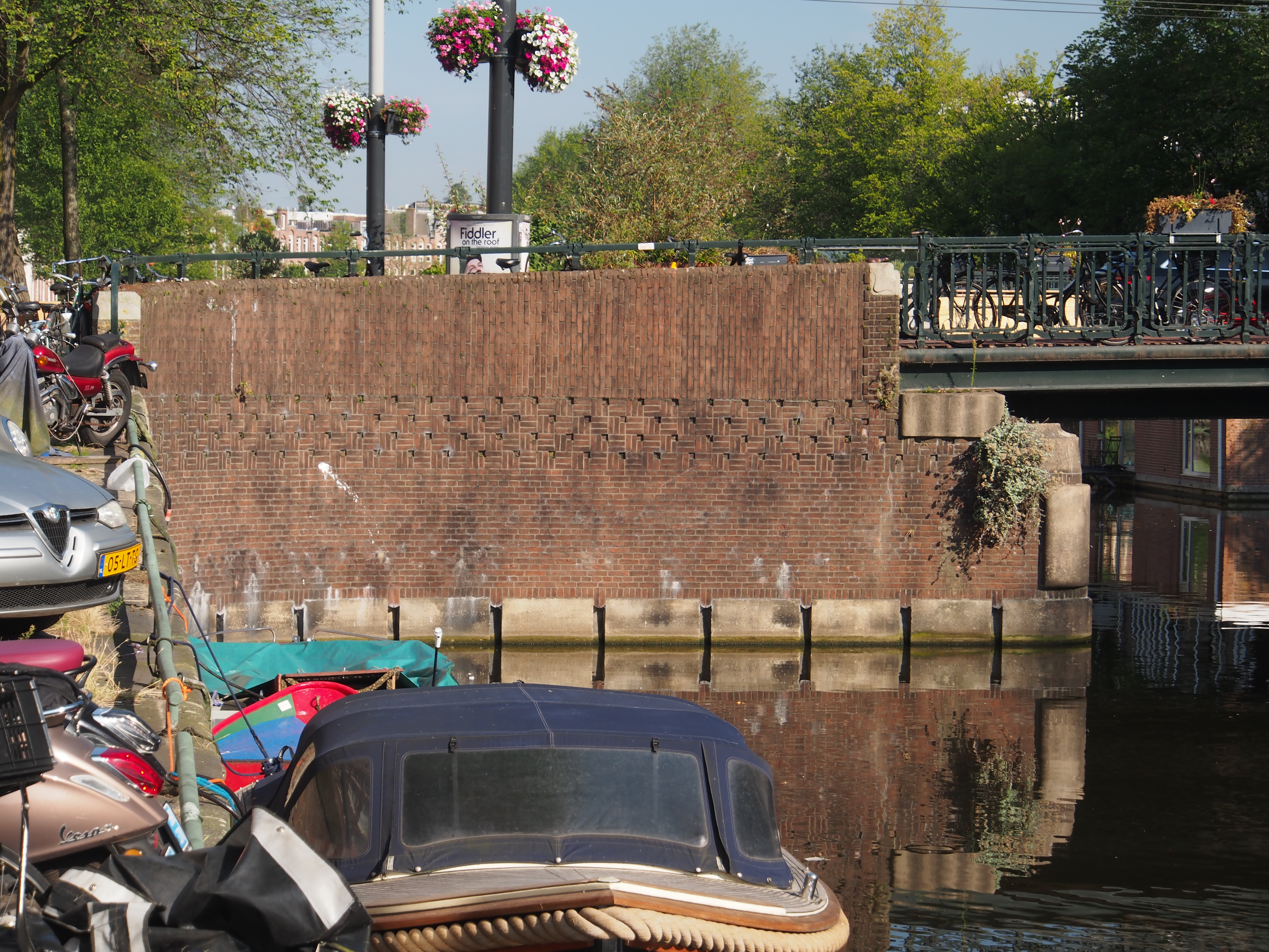 Brug 183.